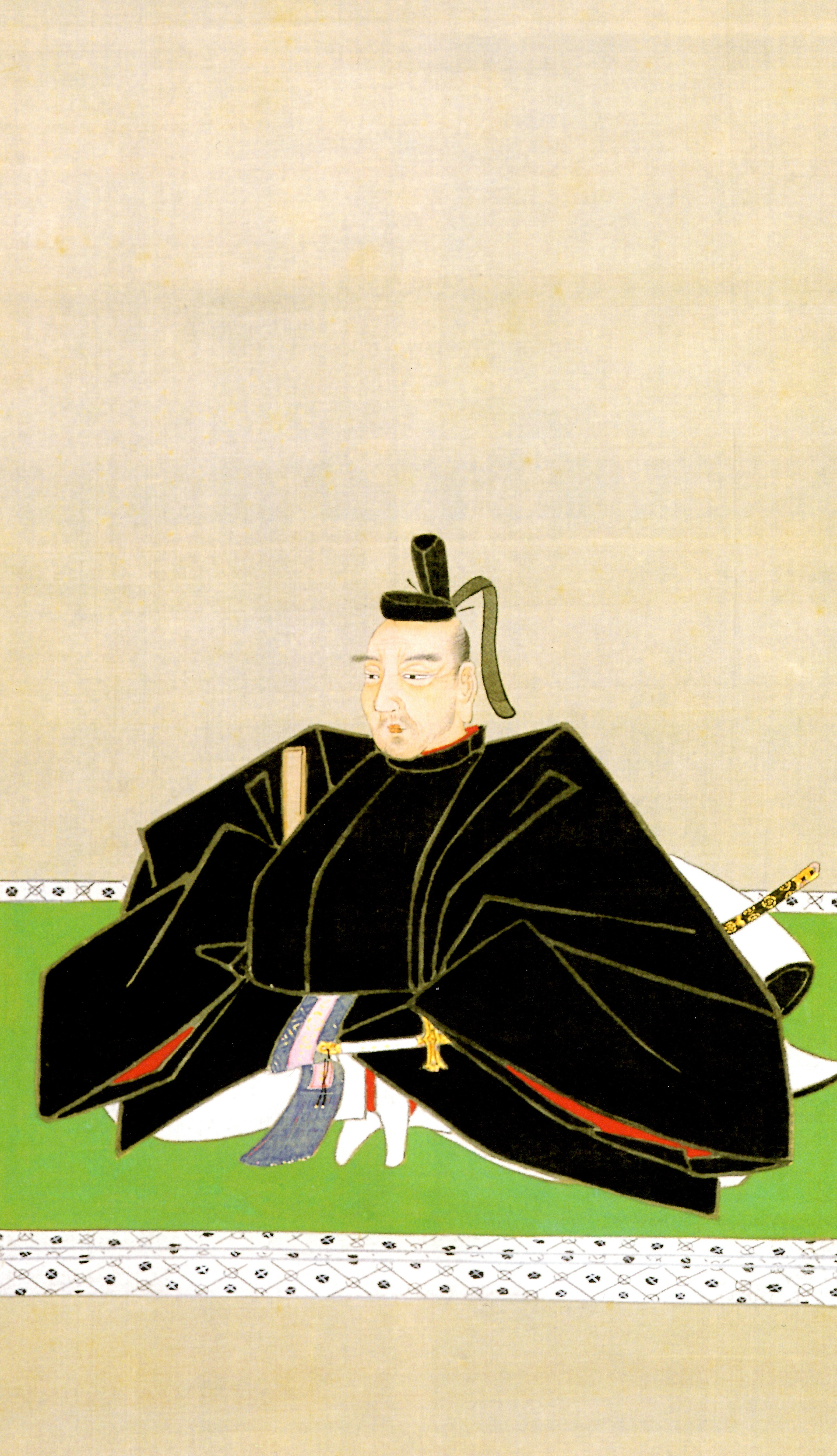 秋元喬知の肖像。